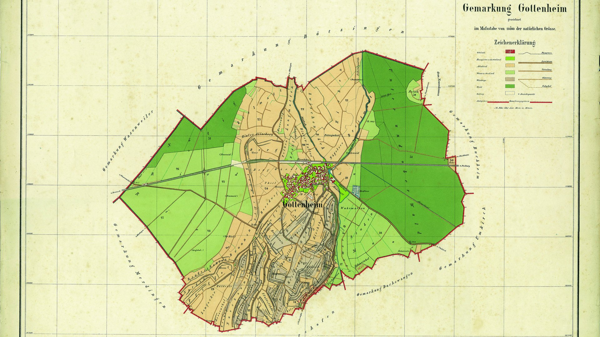 Gottenheim Gemarkungsatlas 1883, mit Flurnamen